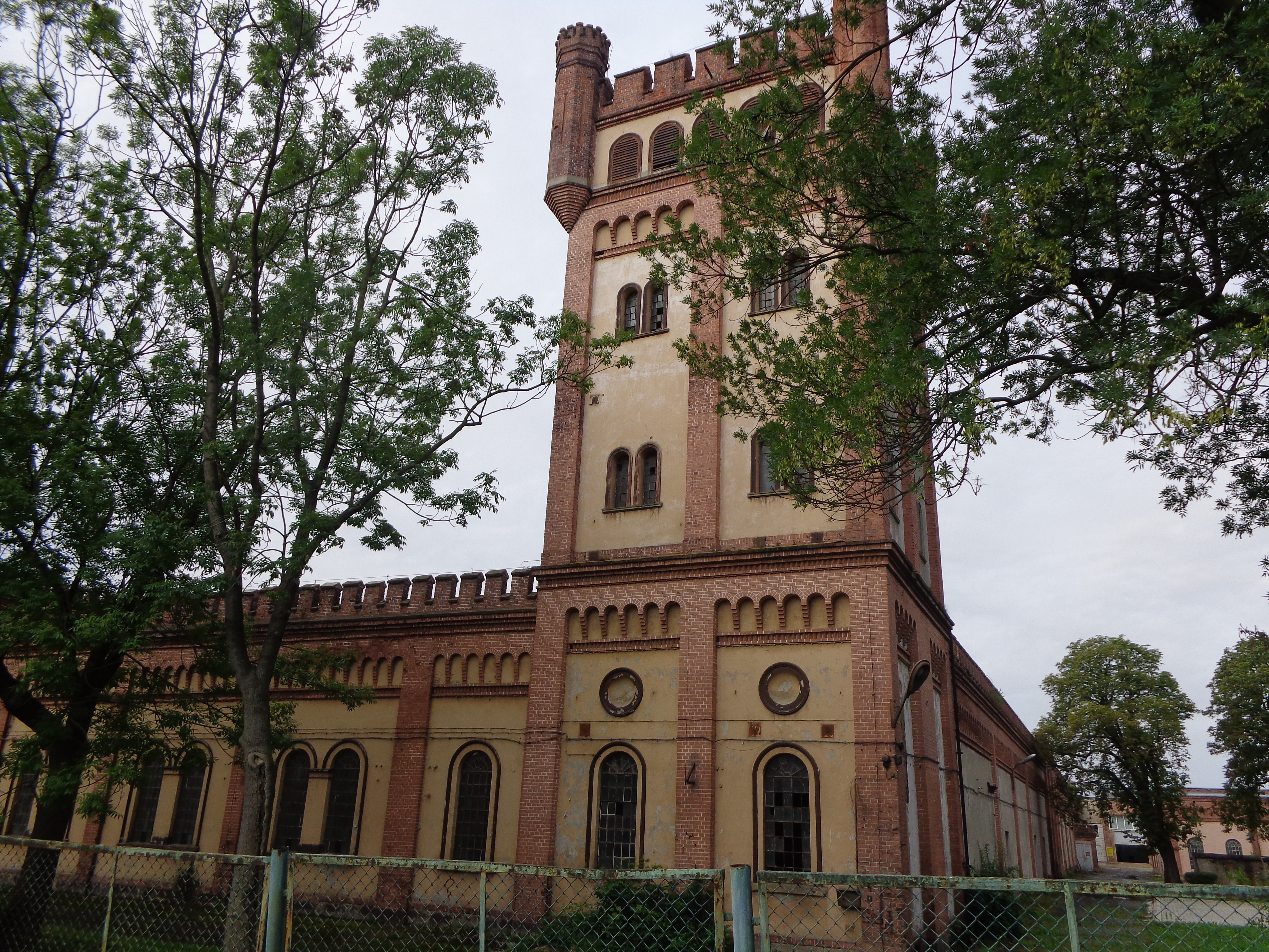 Narożna wieża od strony Tkalni byłych Zakłady Przemysłu Bawełnianego „Frotex“ w Prudniku. Stan na 20 lipca 2018.